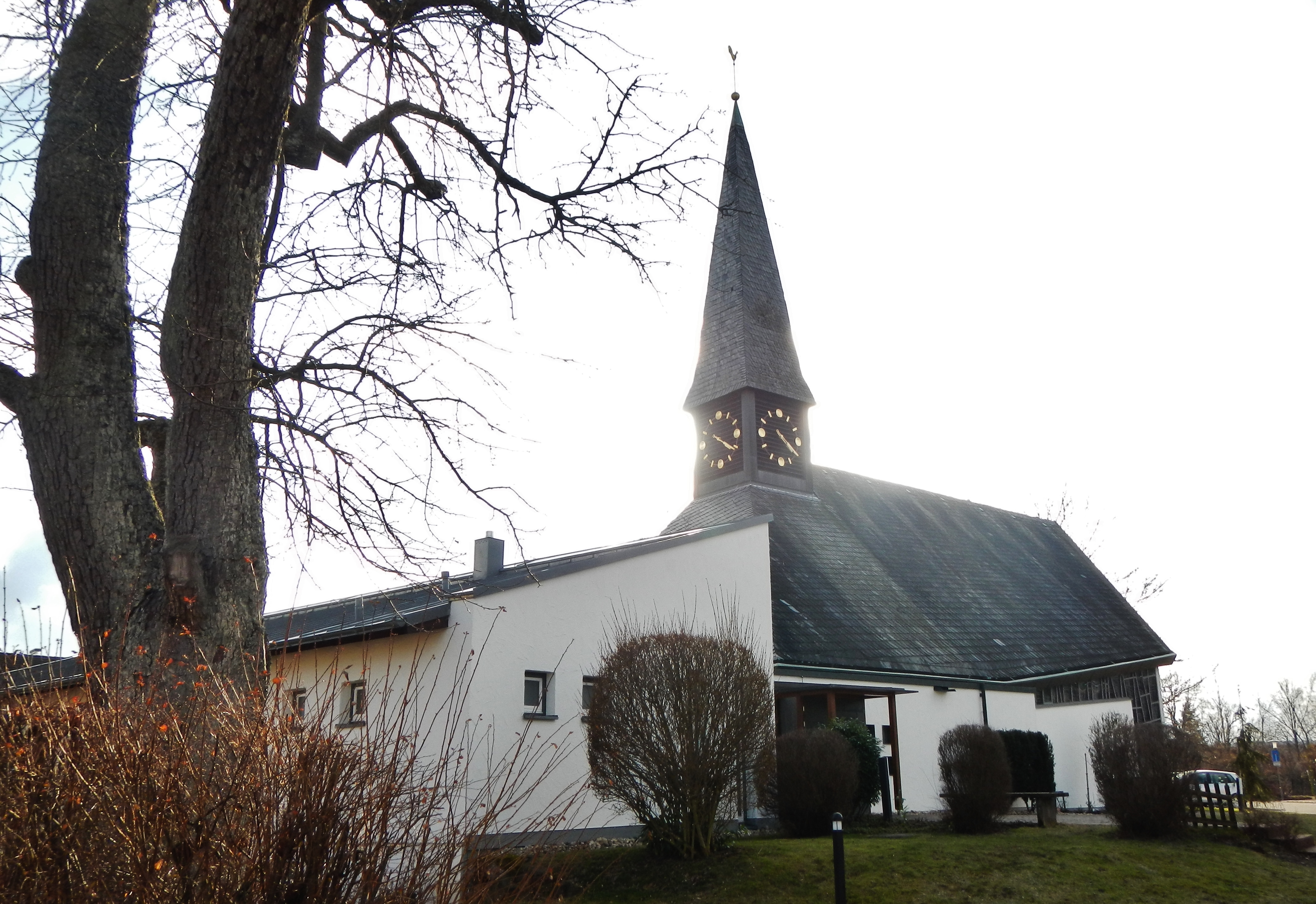 Evangelische Christuskirche Unterhaugstett